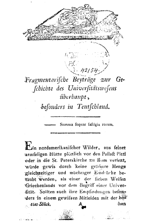 1790-1791 Dresden - Annalen der Teutschen Akademien